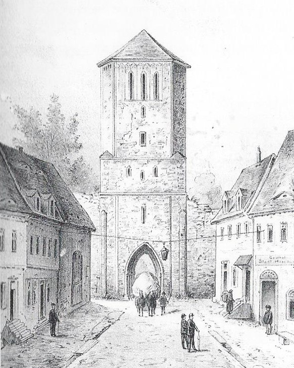 Lithografie des Steintorturms in :de:Halle (Saale)